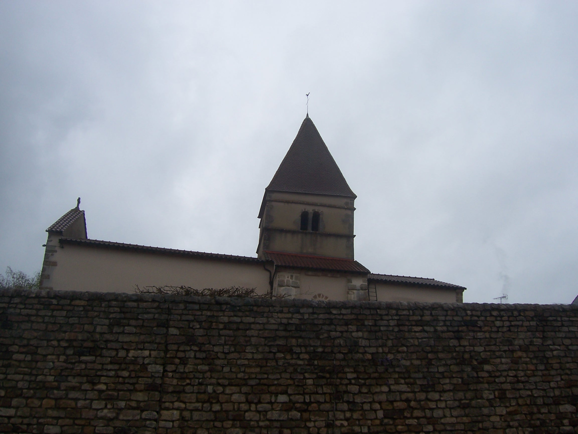 Eglise de Grandvaux